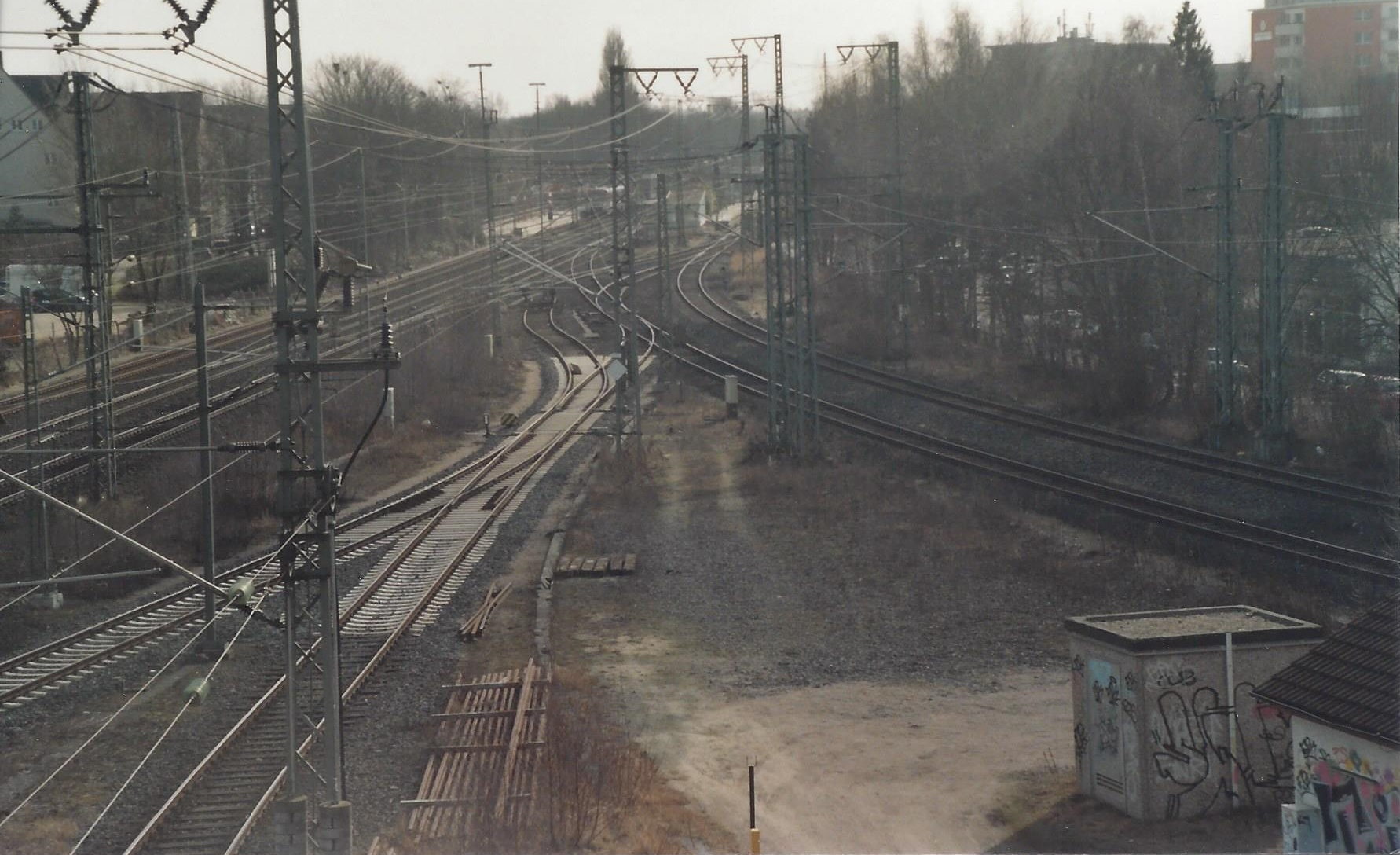 Fotografie des Bahnabzweigs nördlich vom Bahnhof Elmshorn